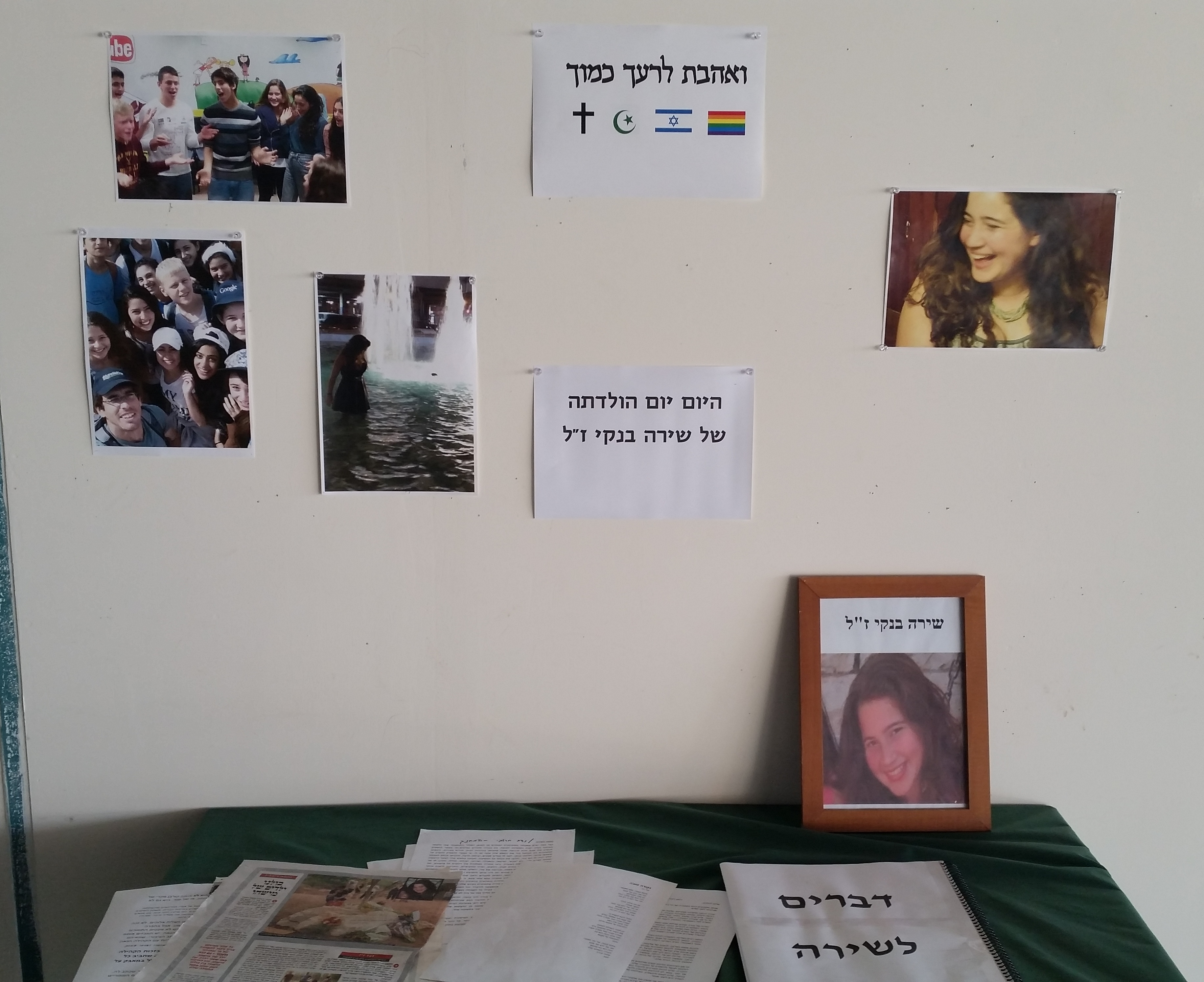 פינת זיכרון לשירה בנקי בבית ספרה - התיכון ליד האוניברסיטה